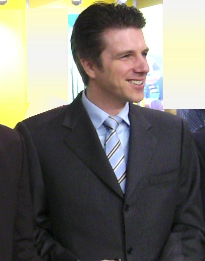 Christoph Hartmann